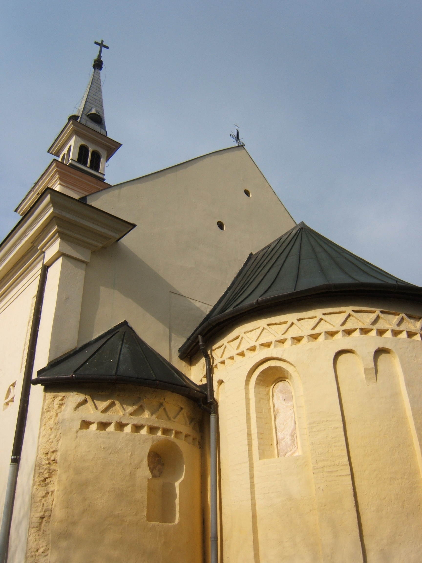 Lengyeltóti, templom